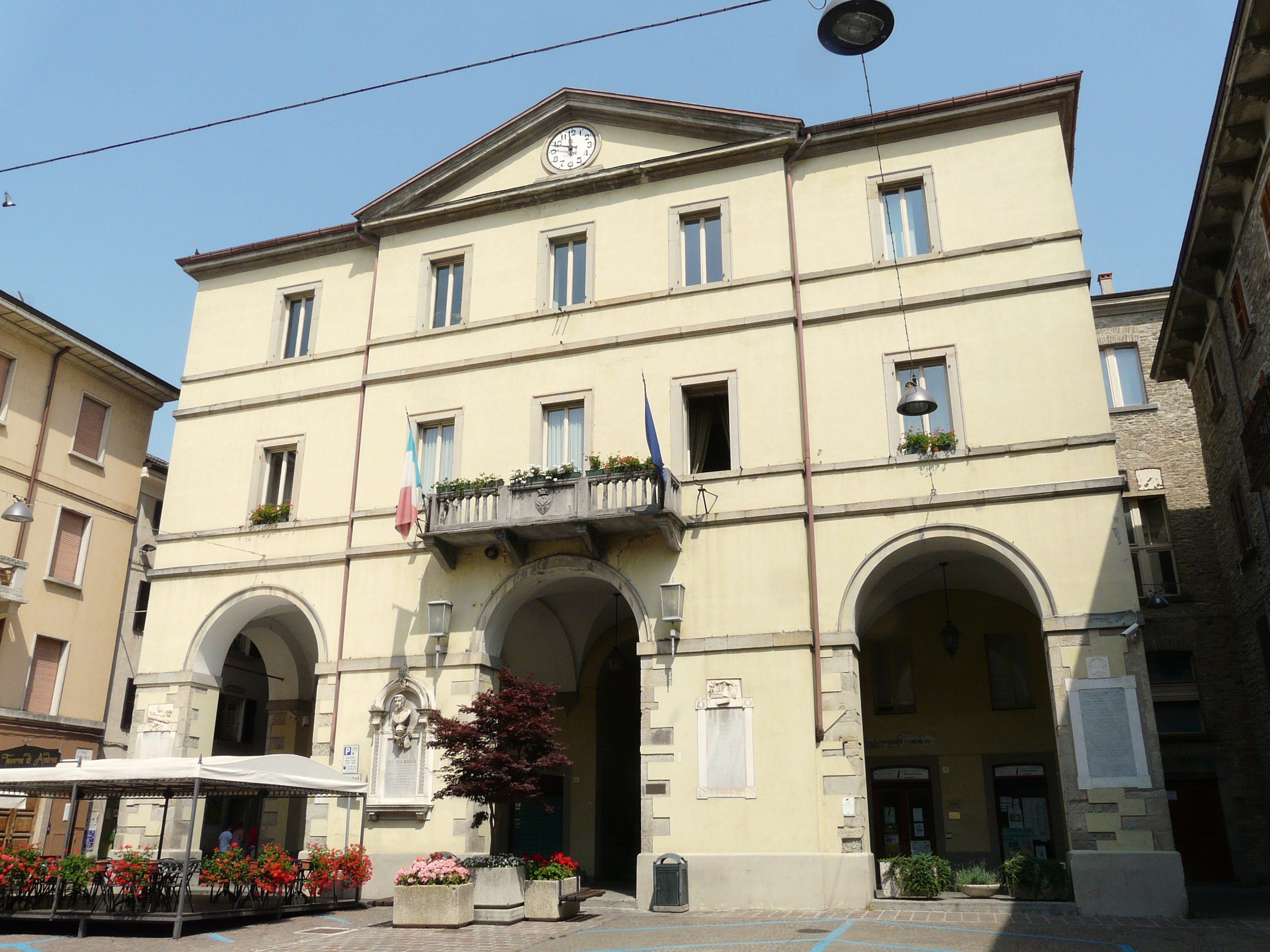 Municipio, Borgo Val di Taro, Emilia Romagna, Italia